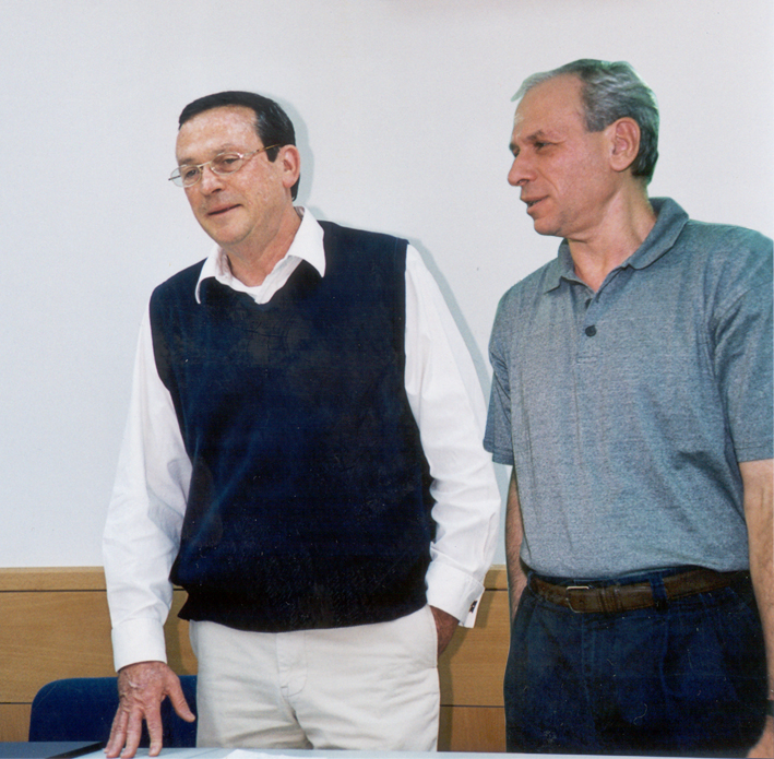 יהודה וזהר זיסאפל